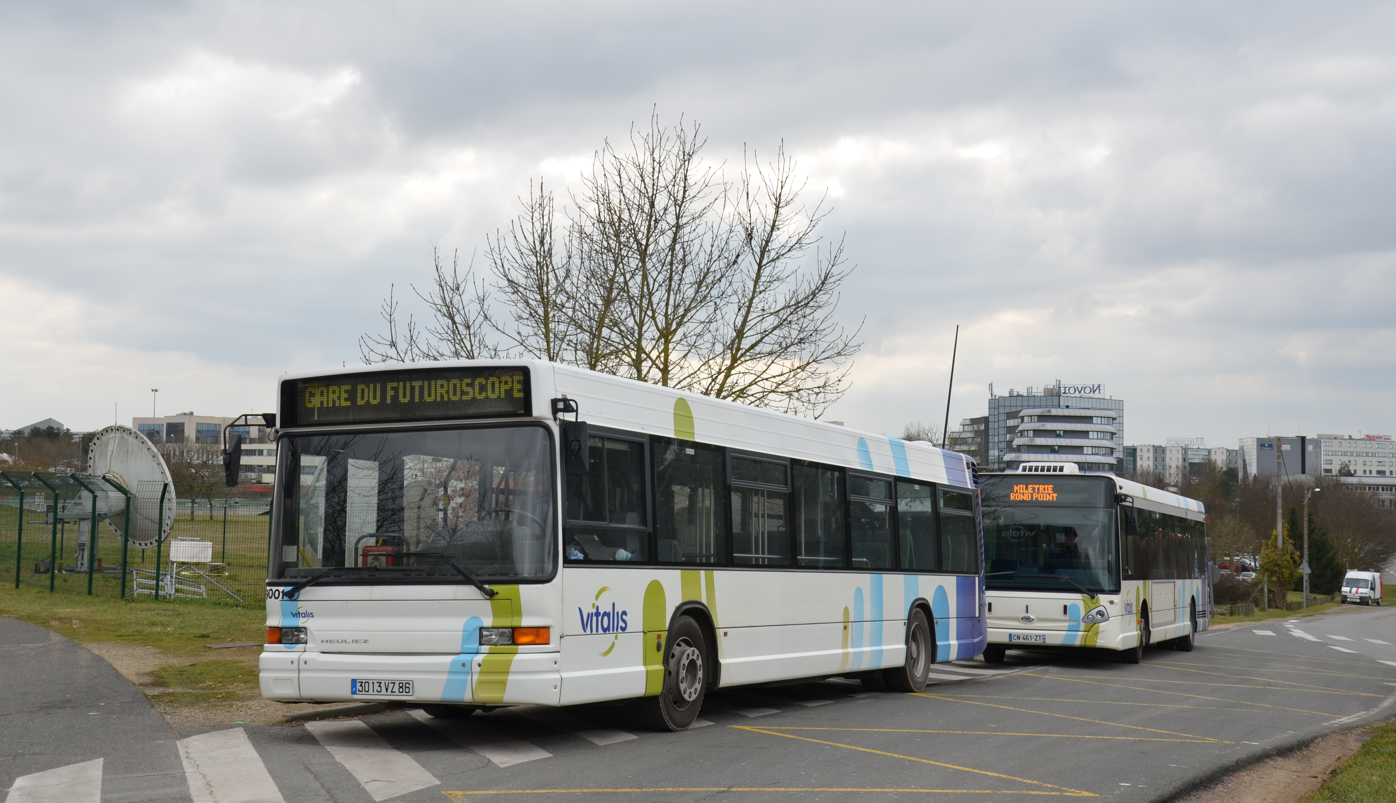 Heuliez GX 317 n°9001 de la navette Gare du Futuroscope, avec un GX 327 n°237 de la ligne 1 du réseau Vitalis, au terminus Futuroscope Lycée Pilote.